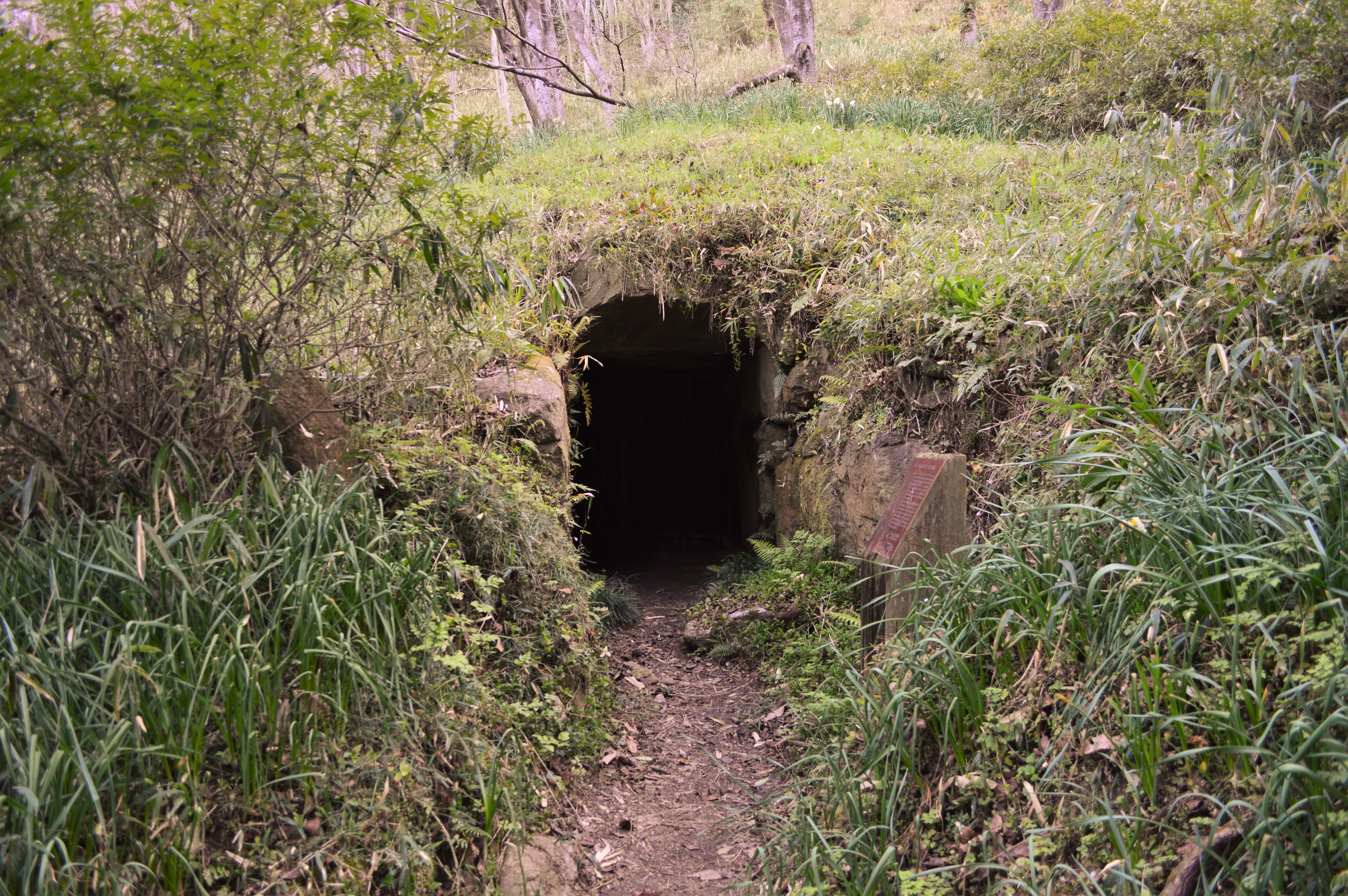 平尾山古墳群平野・大県支群 第11支群4号墳 石室開口部